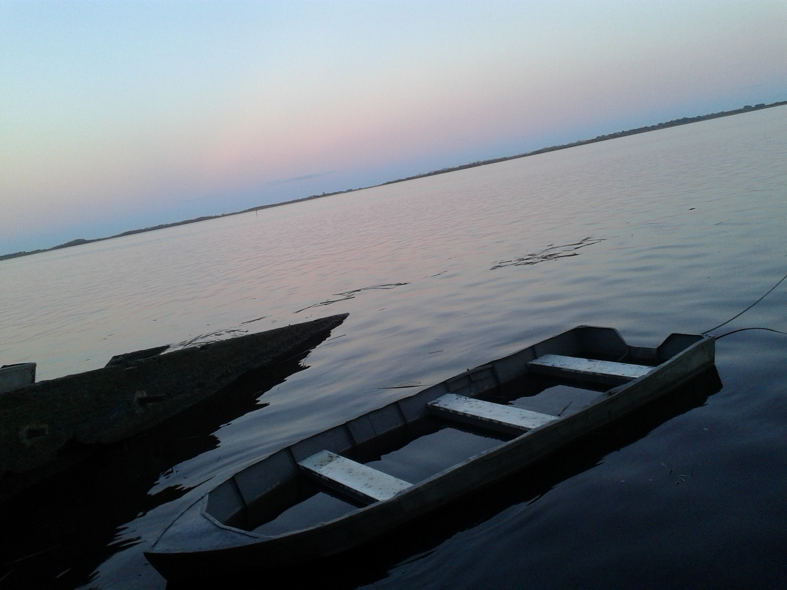 Bote hundido en la laguna de lobos provincia de Buenos Aires, donde la naturaleza te invita a descansar y a tenerla siempre presente.